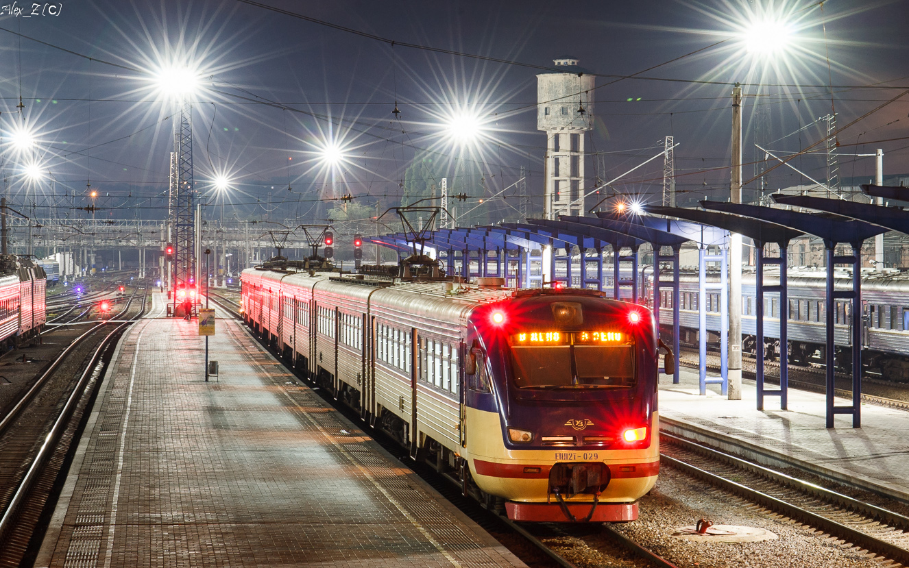 Электропоезд построен в 8-вагонной составности С завода в 2008 г. поступил в депо Днепропетровск Приднепровской ж.д.